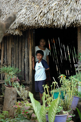 Yucateken